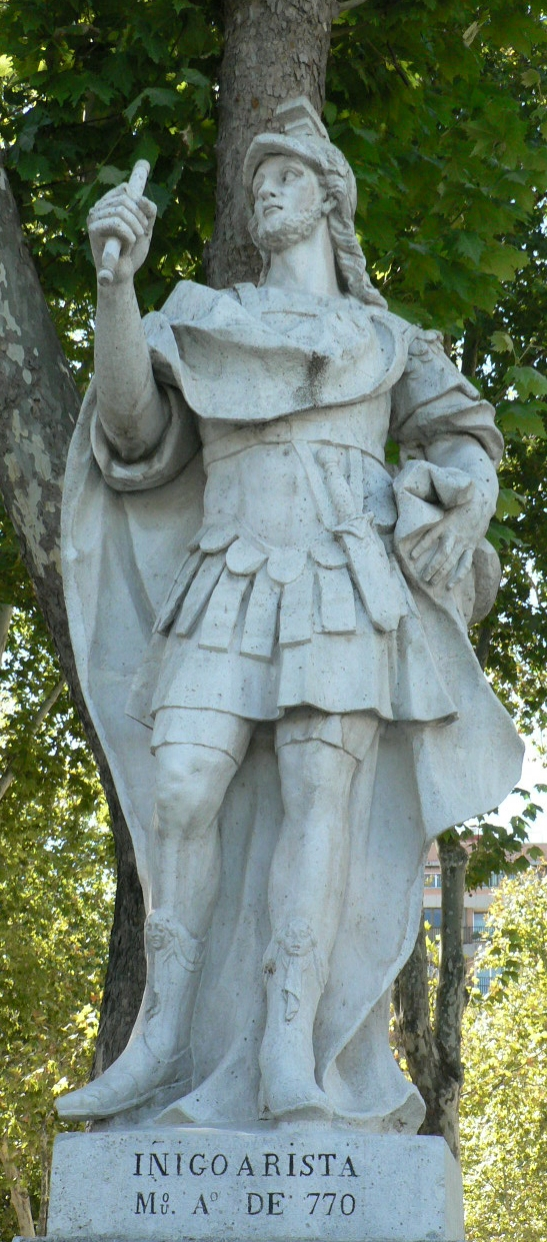 Íñigo Arista es el sobrenombre de Íñigo Íñiguez, que fue el primer rey de Pamplona (así se denominaba lo que hoy conocemos como Navarra). Nació hacia 781 y era hijo de Íñigo Jiménez, jefe vascón, y de Oneka, que al enviudar se casó con Muza, de la familia muladí de los Banu Qasi de Zaragoza. Estátua en piedra blanca, en la Plaza de Oriente (Madrid)